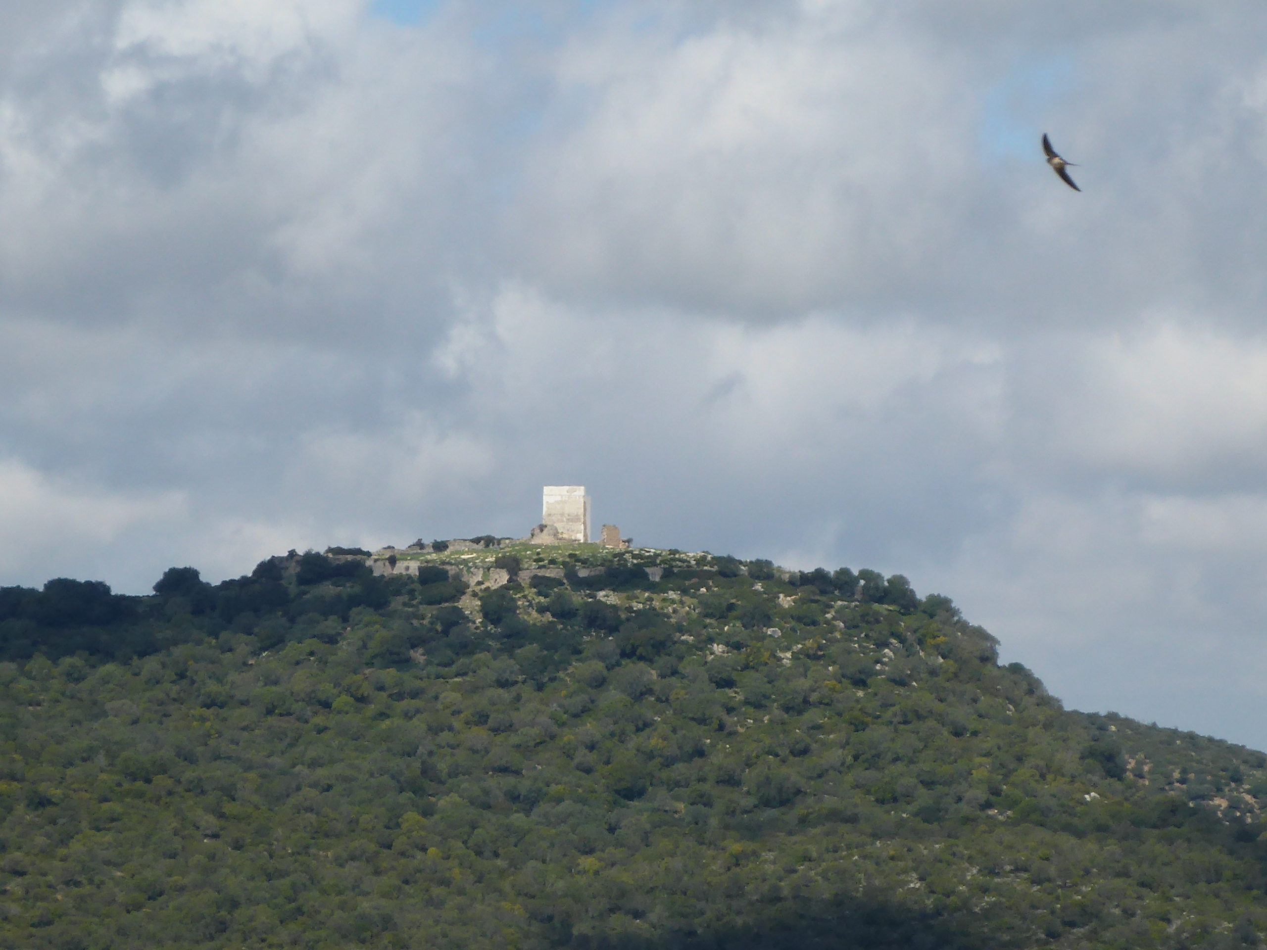 Castillo de Matrera desde el Instituto Carlos III, Prado del Rey (Andalucía, España)